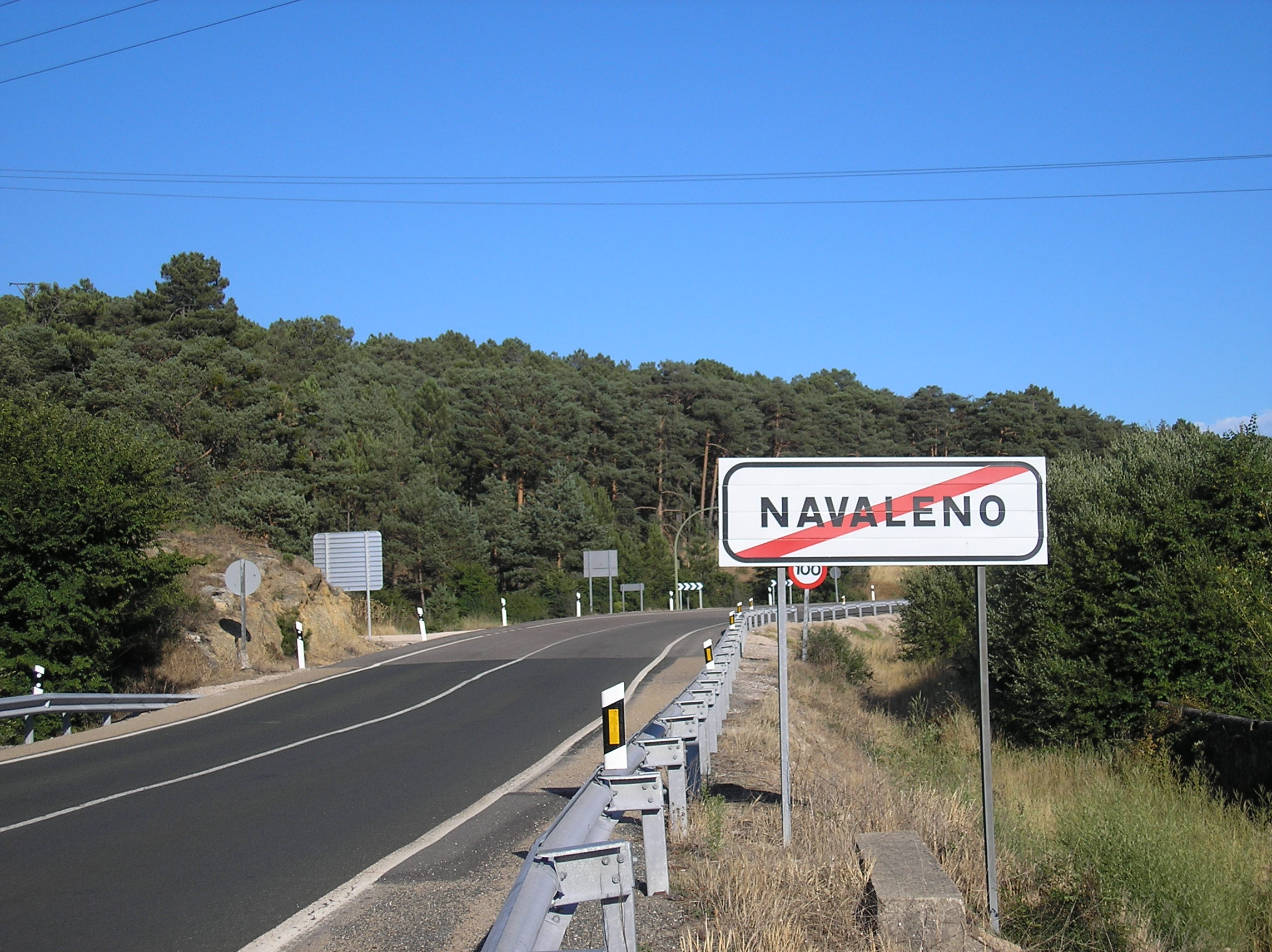 Navaleno Road. N-234